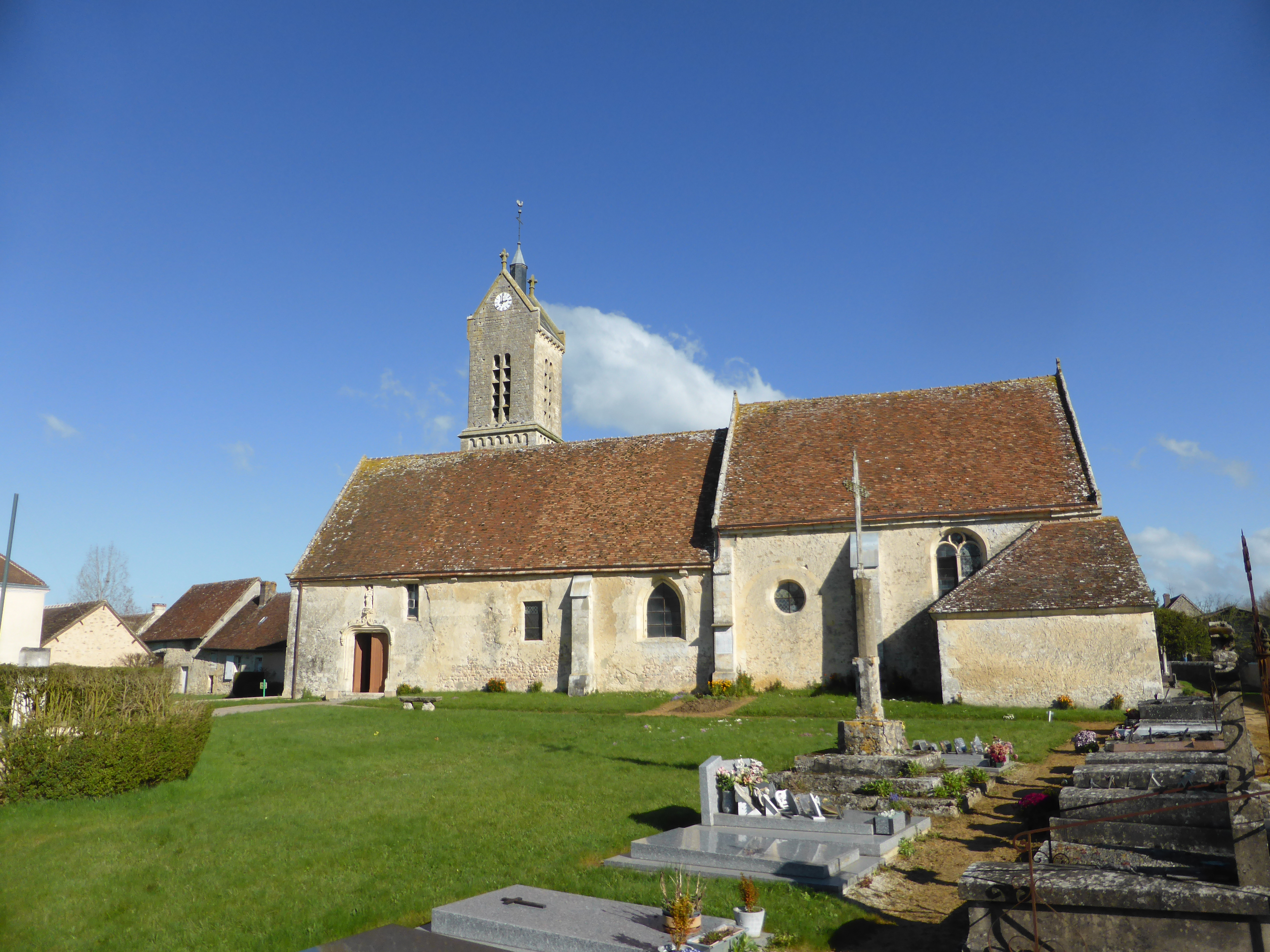 Église et cimetière d'Appenai-sous-Bellême, dans l'Orne.